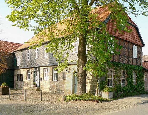 Geburtshaus von Heinrich Büssing , heute als Heinrich Büssing Haus ein Museum des MAN-Konzerns.